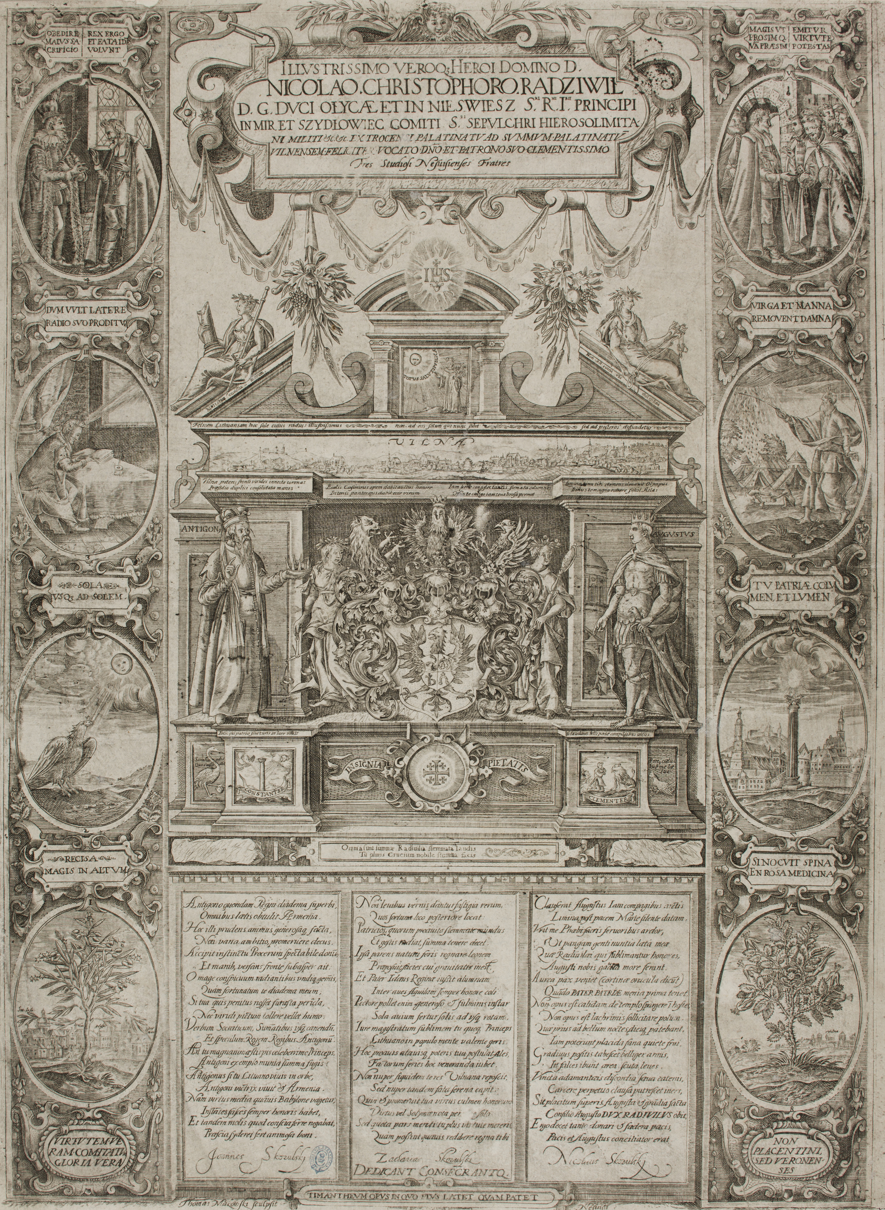 Беларуская (тарашкевіца): Панэгірык братоў Скарульскіх (Skarulski)